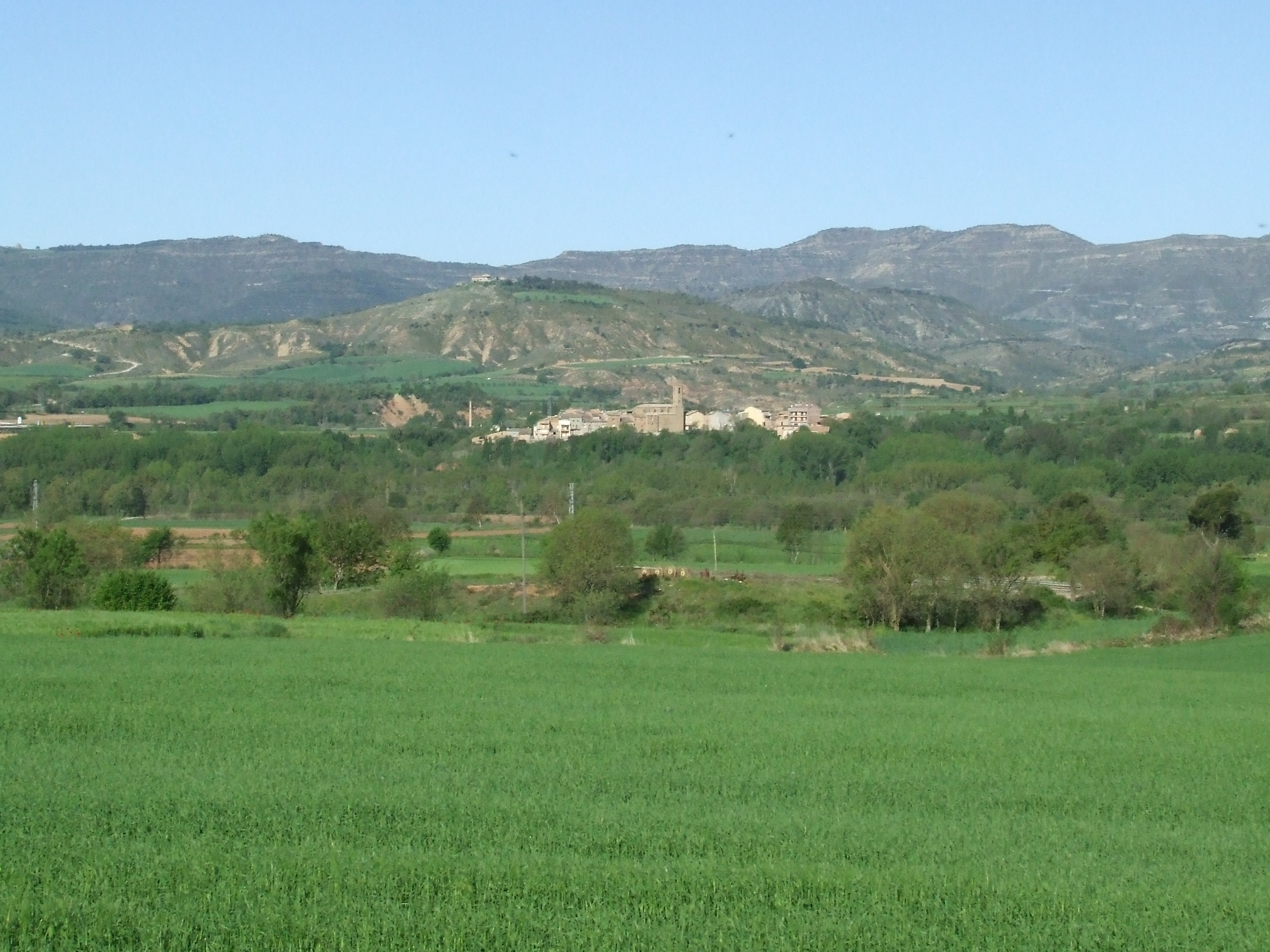 Vista general de l'antic terme de Palau de Noguera (Tremp, Pallars Jussà)